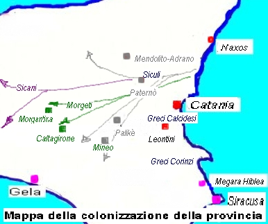 Mappa della colonizzazione della provincia di Catania